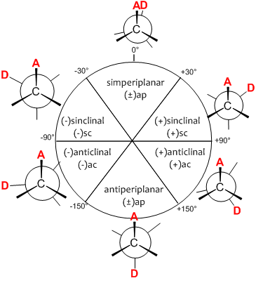 definições que descrevem um confôrmero específico.